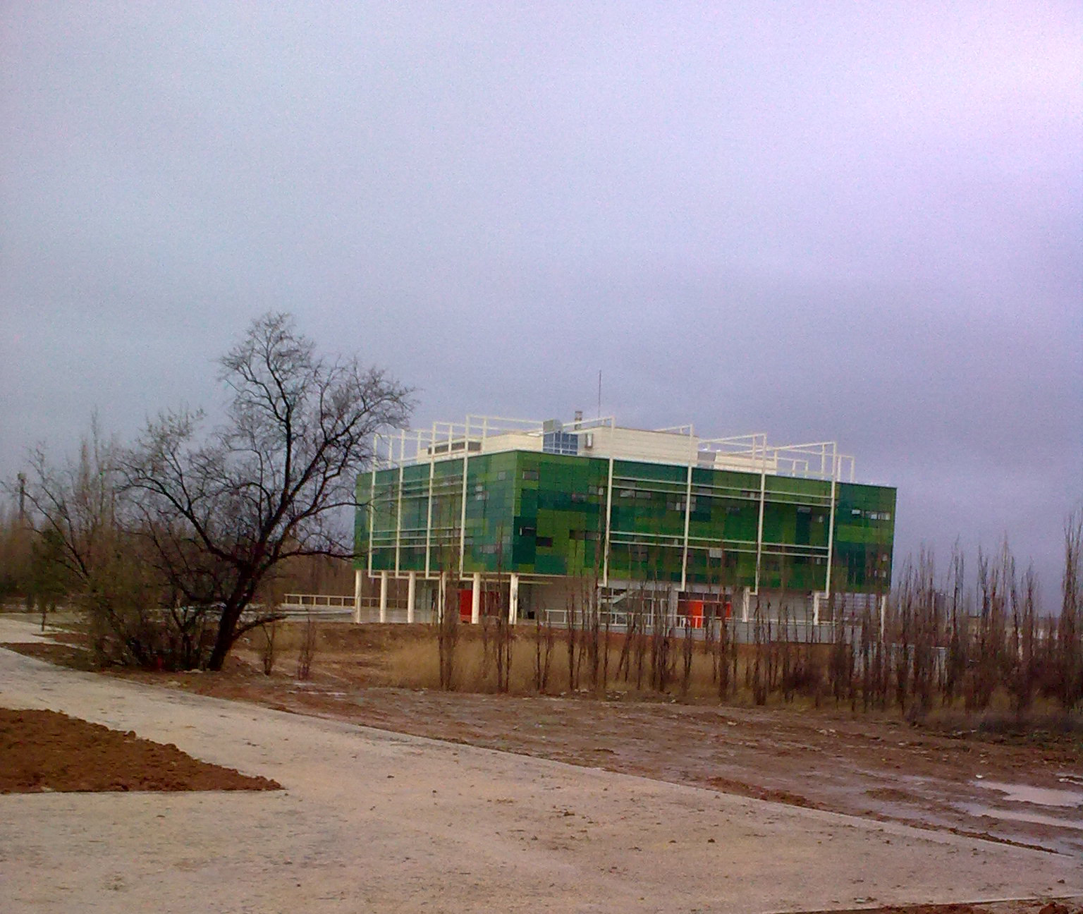 ODTÜ Teknokentte bulunan bir bina.